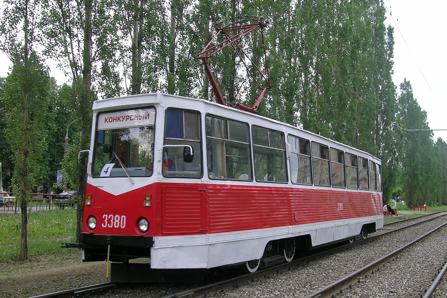 Трамвайный вагон 71-605 (КТМ-5) в Нижнем Новгороде, на демонтированной в 2009 году линии по проспекту Ленина. Вид спереди слева.